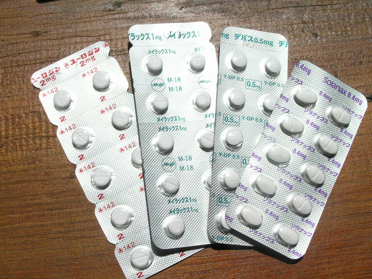 ベンゾジアゼピン系トランキライザー一覧 ～photo by Autumn Snake 【おぉたむすねィく探検隊】 公式ブログ：